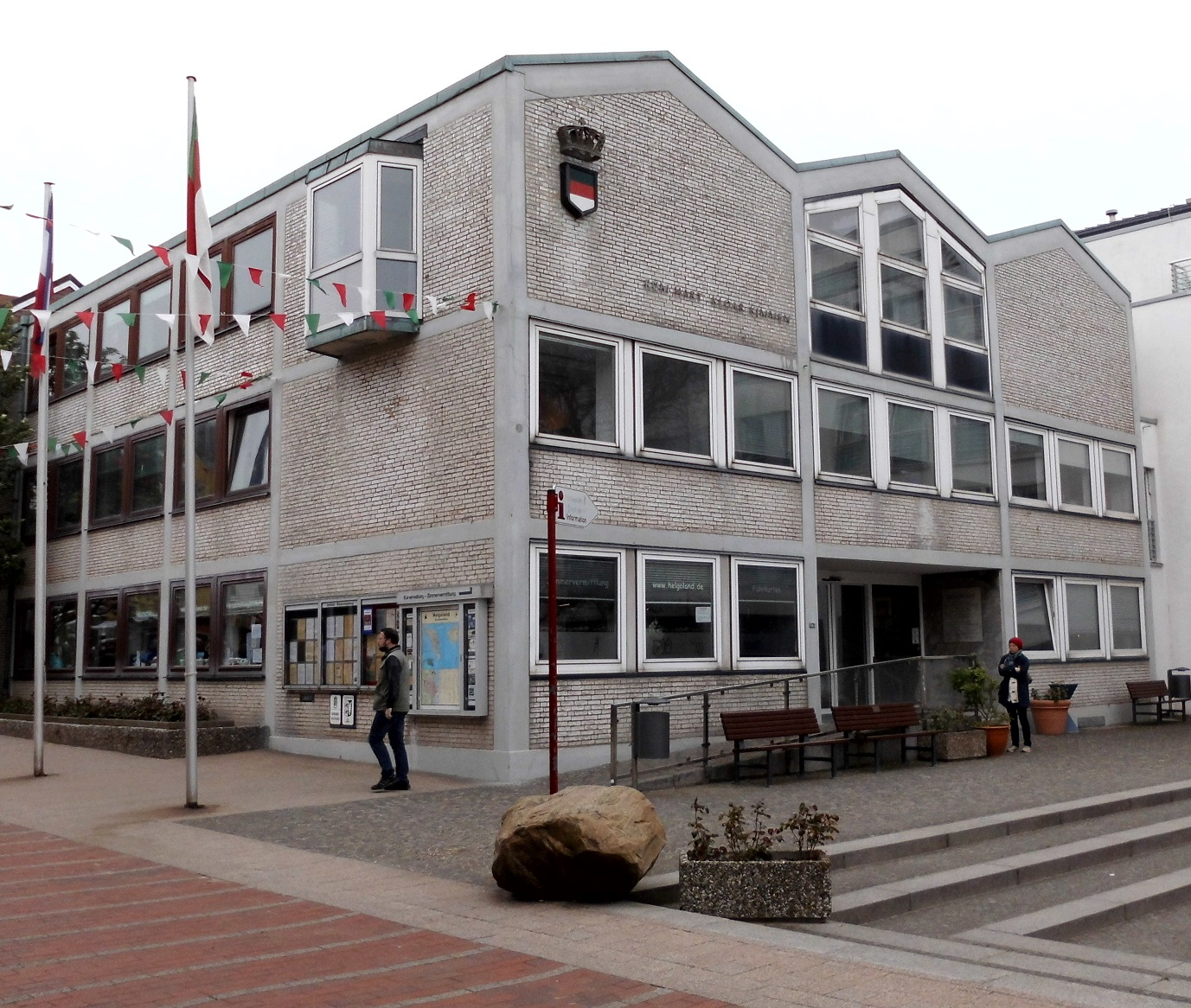 Das Rathaus im Lung Wai 28 auf der Insel Helgoland.